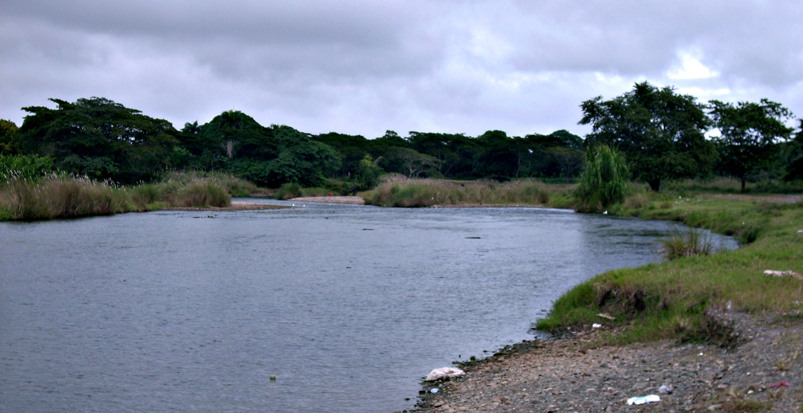 Río Yuna, el segundo río más importante de República Dominicana.